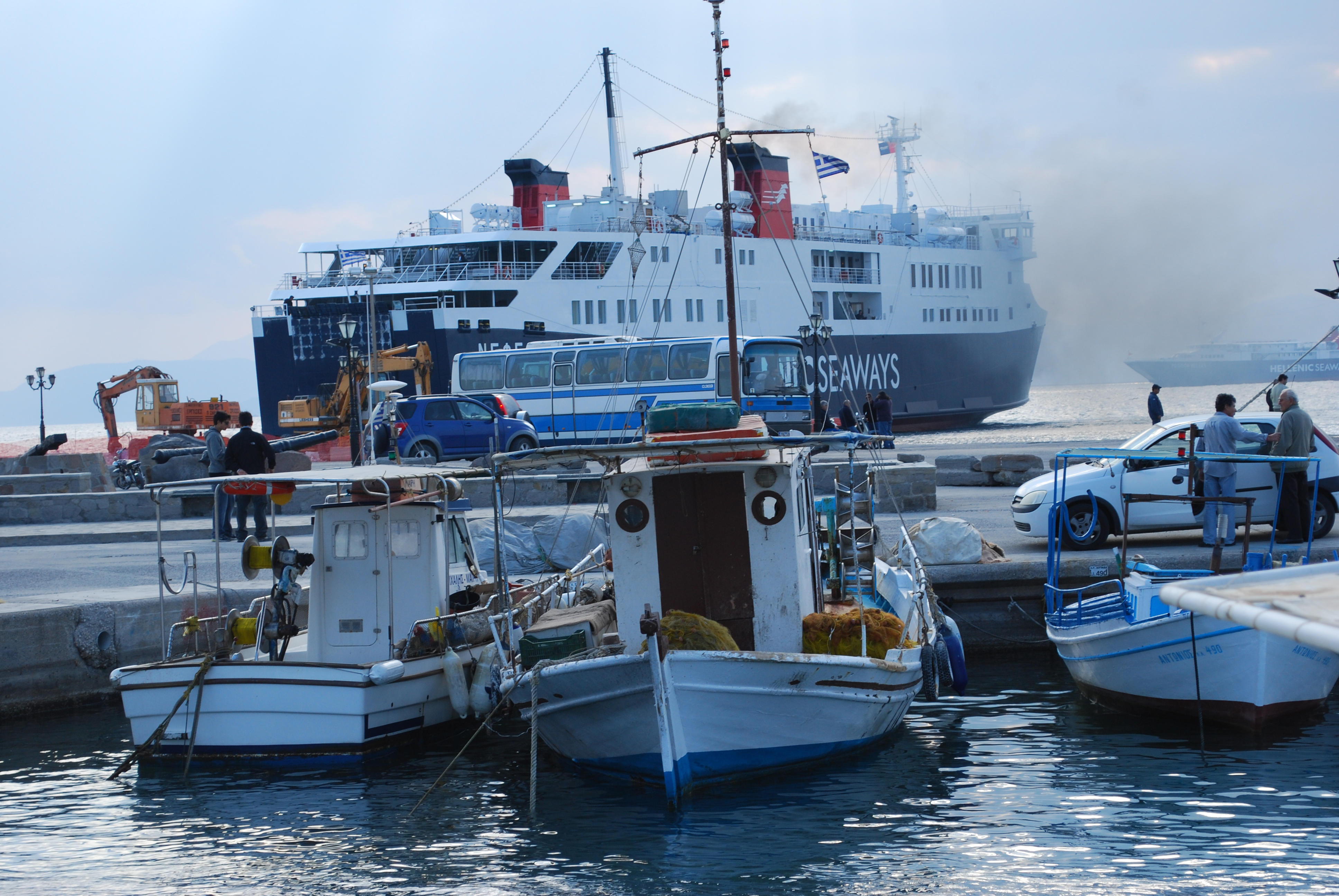 Le ferry "Nefeli" de Hellenic Seaways, dans le port d'Egine.